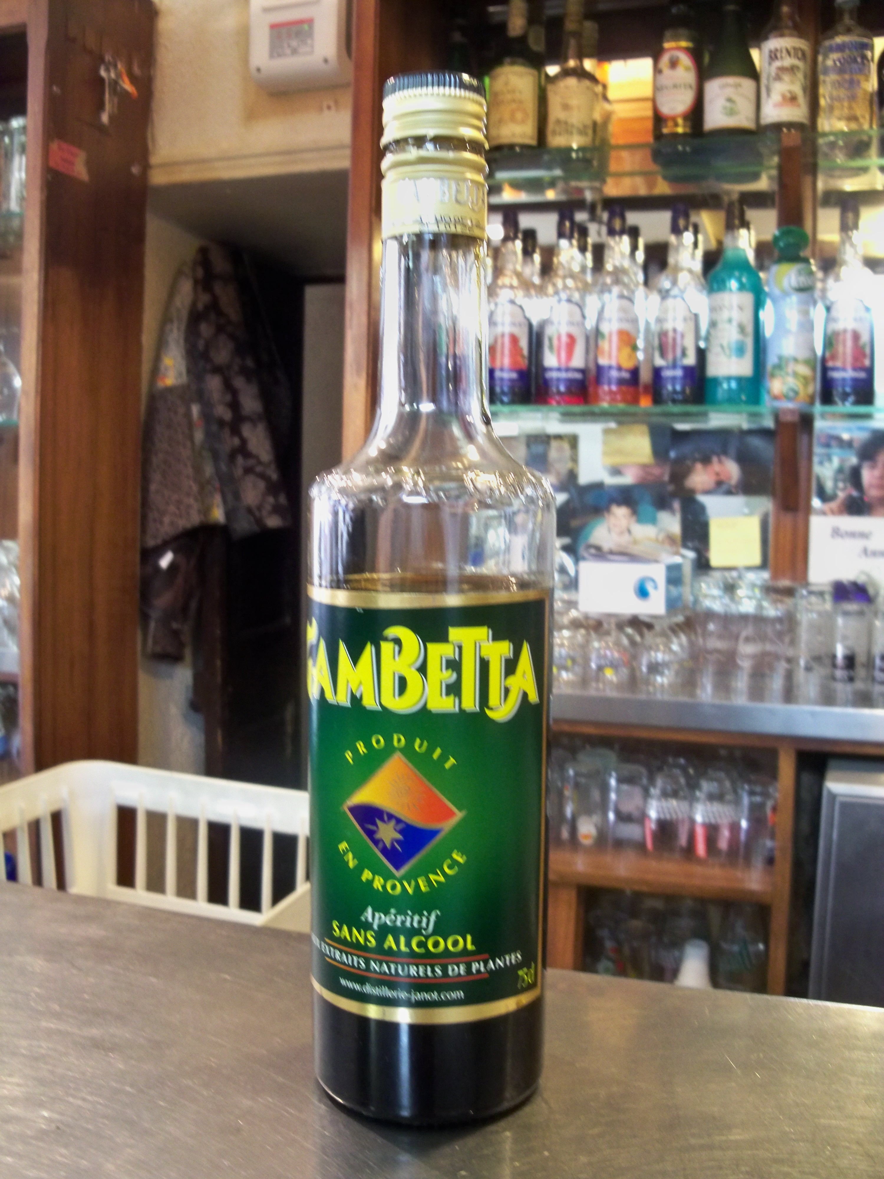 Gabetta, apéritif sans alcool